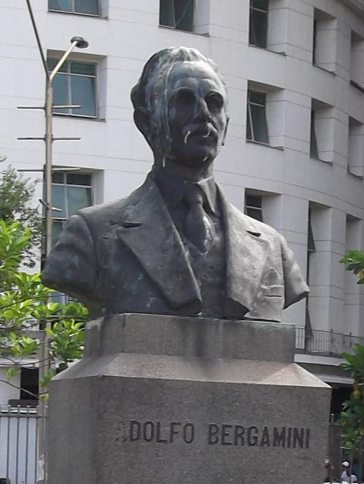 Busto de Adolfo Bergamini. Praça Monroe, Cinelândia, cidade do Rio de Janeiro, Brasil.